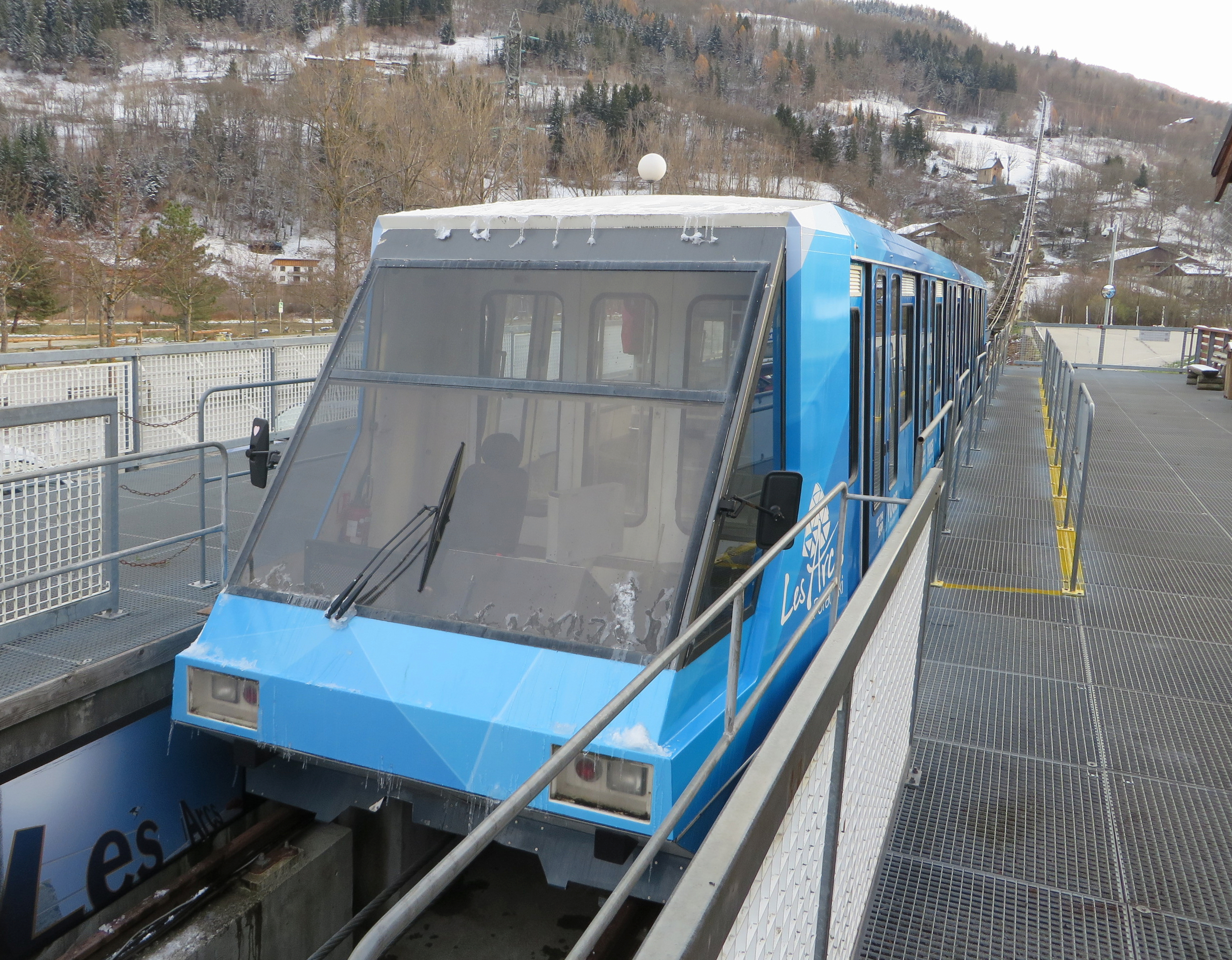 Funiculaire reliant Bourg-Saint-Maurice à la station Les Arcs 1600.